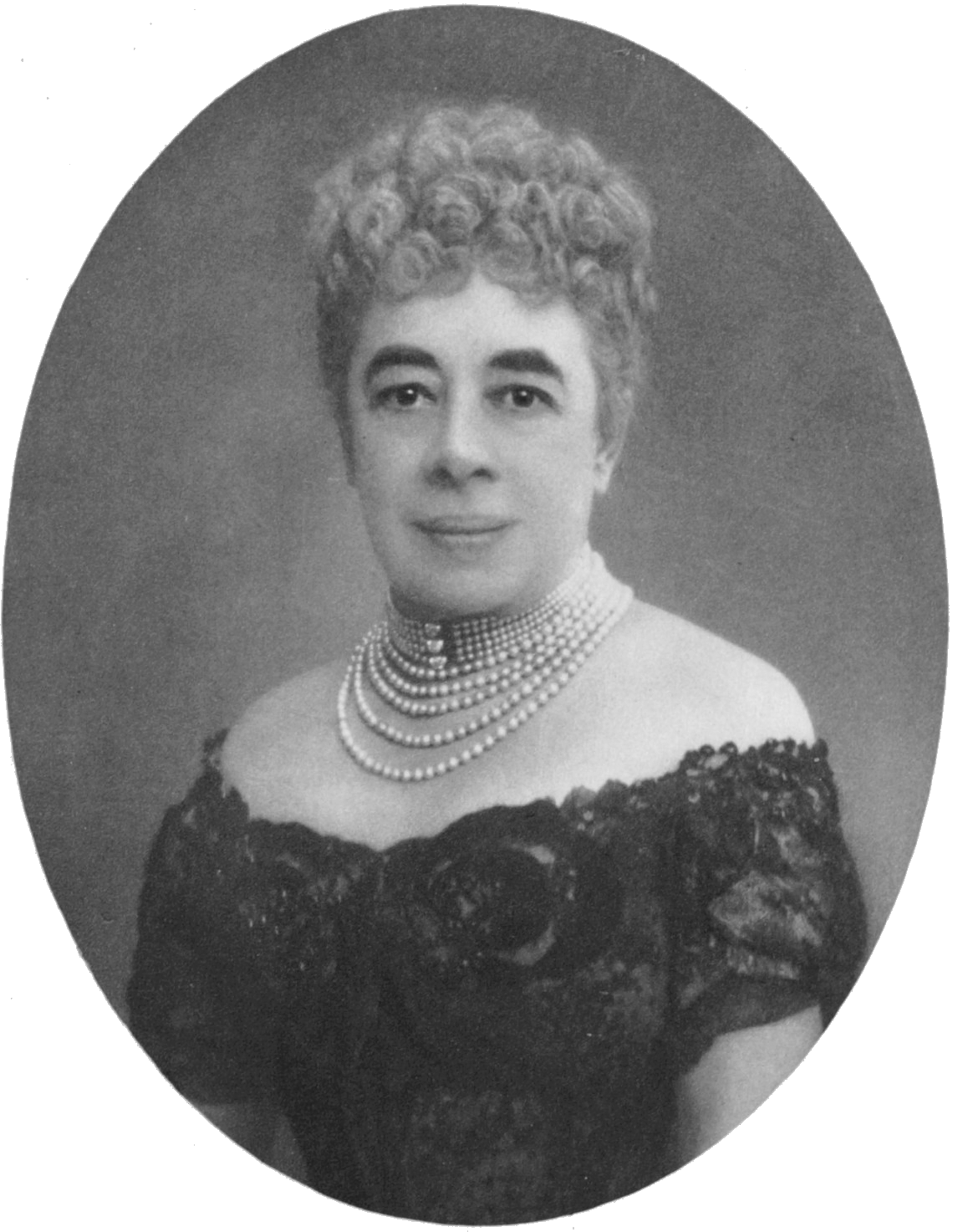 Pauline von Metternich-Sandor (1836-1921)